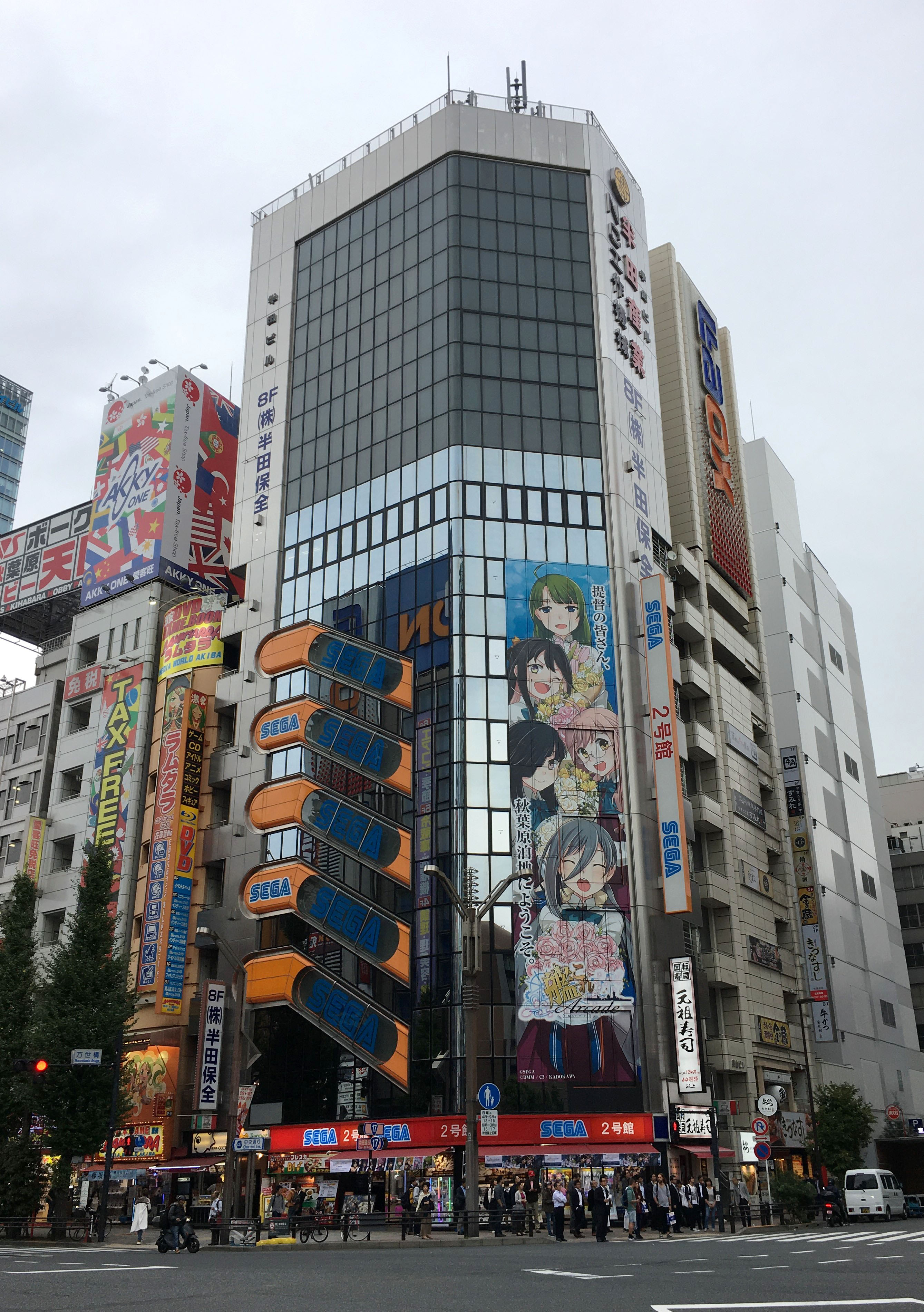 半田ビル（秋葉原）